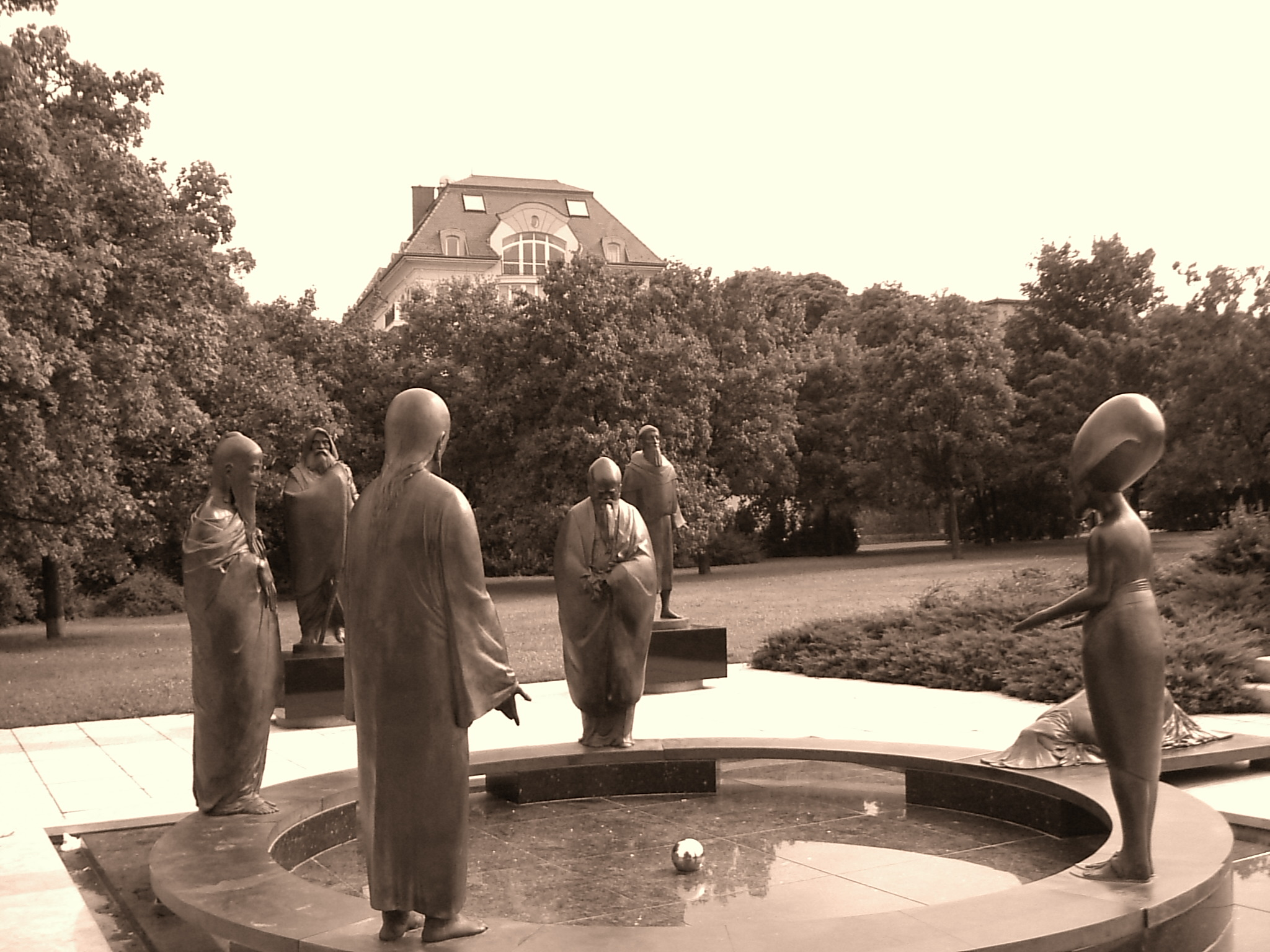 Wagner Nándor: Filozófiai-kert, Budapest, Gellért-hegy